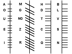 Das Ogam